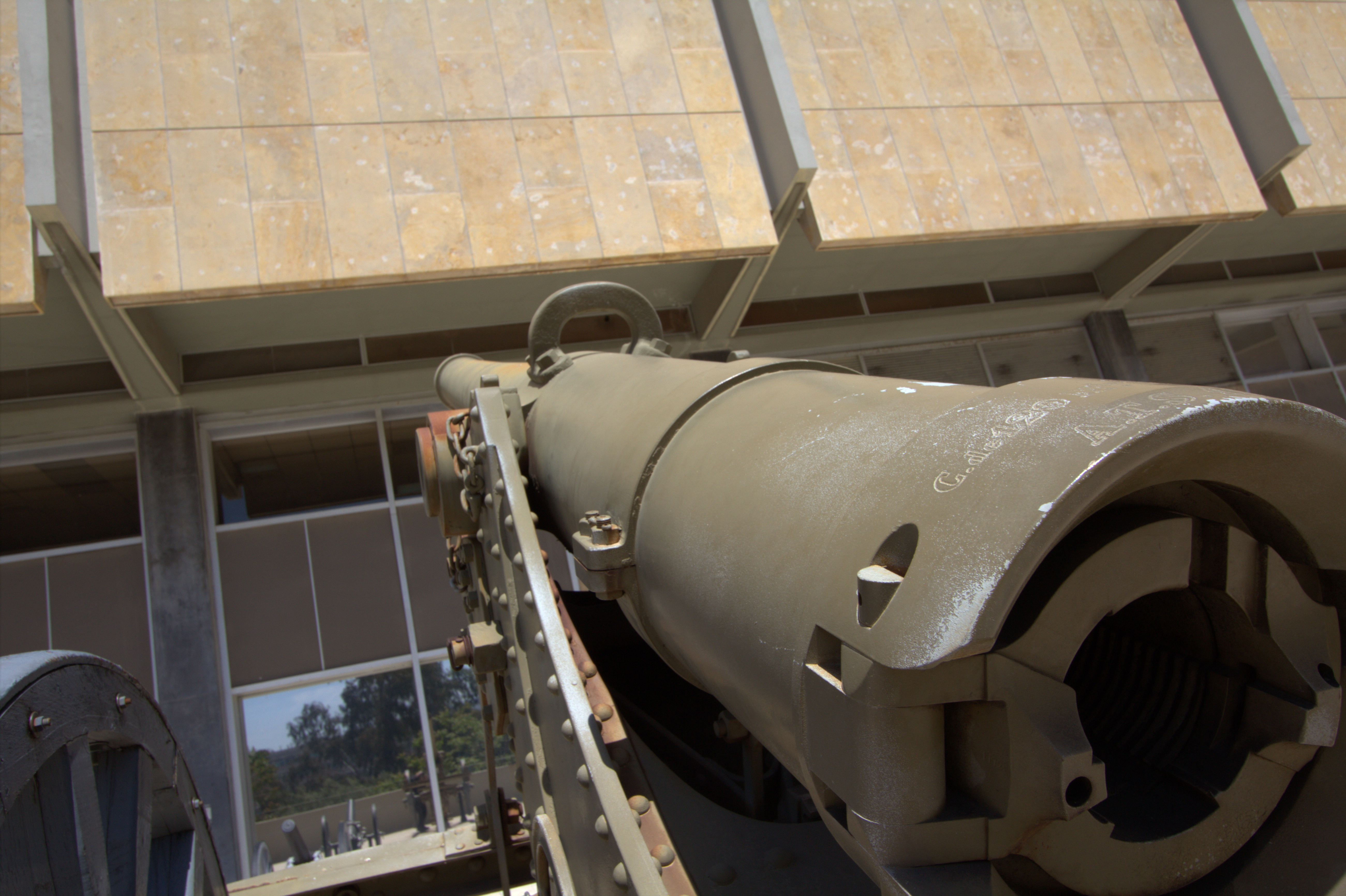 Hellenic War Museum (Athens, Greece). --- Μέσο μακρό πυροβόλο τύπου De Bange. Πολεμικό Μουσείο Ελλάδος. Αθήνα.